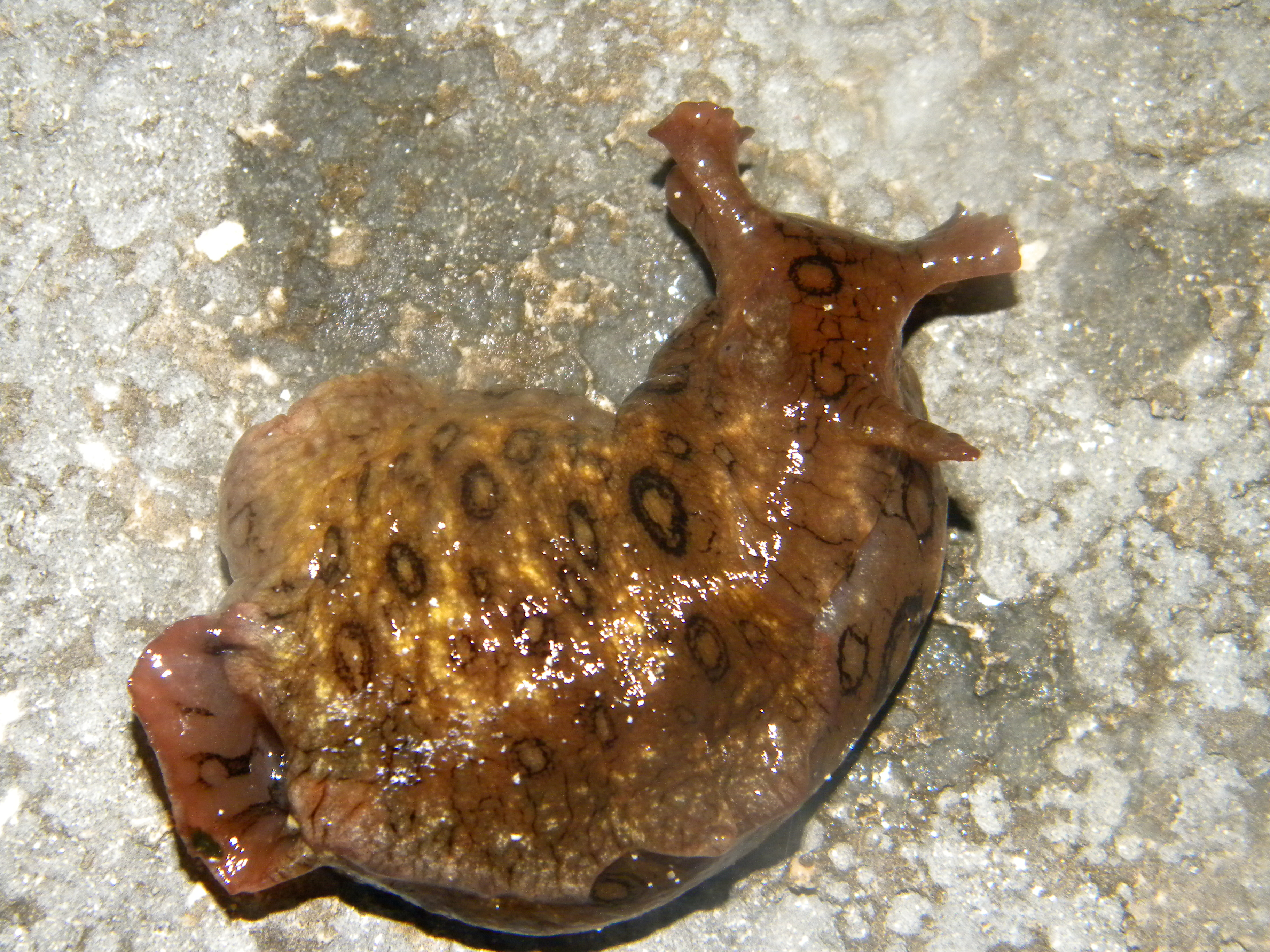 Aplysia dactylomela in Cancun, Mexico